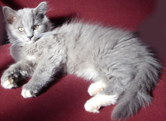 Das Bild zeigt ein Jungtier der langhaarigen blauen Malteserkatze.